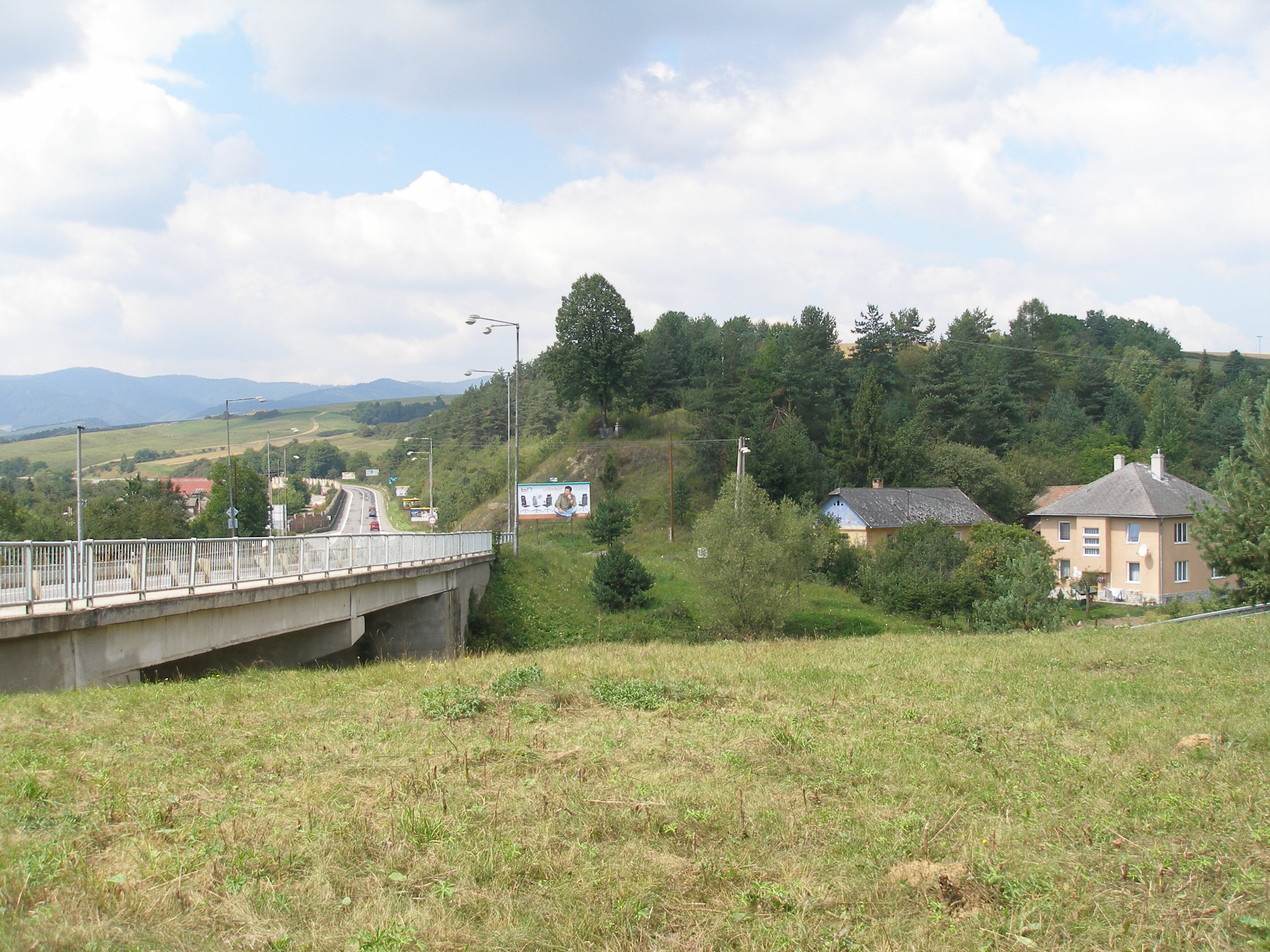 Šarišská obec Bertotovce